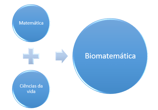 Este é uma visão simplificada do que é biomatemática